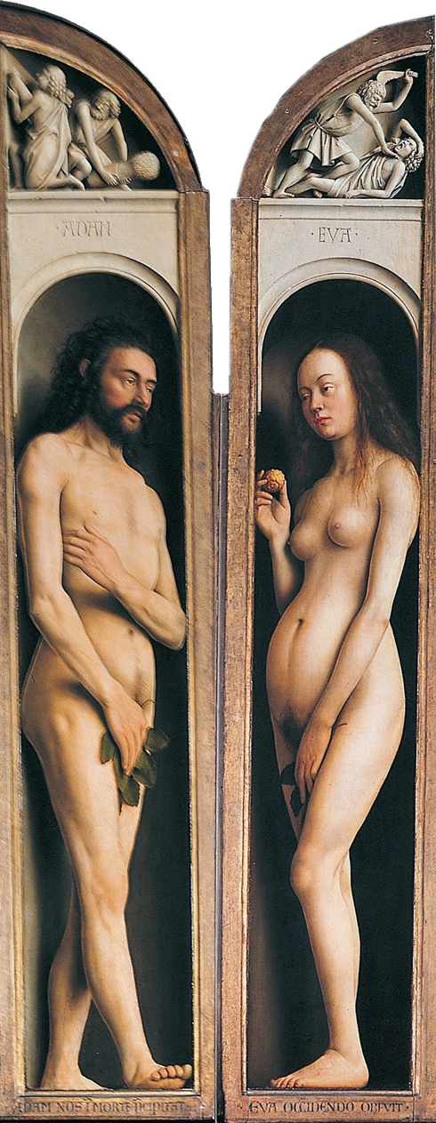 Genter Altar: Zusammenstellung der Ausschnitte mit Adam und Eva